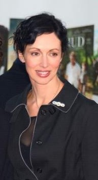 Géraldine Maillet au festival de Deauville